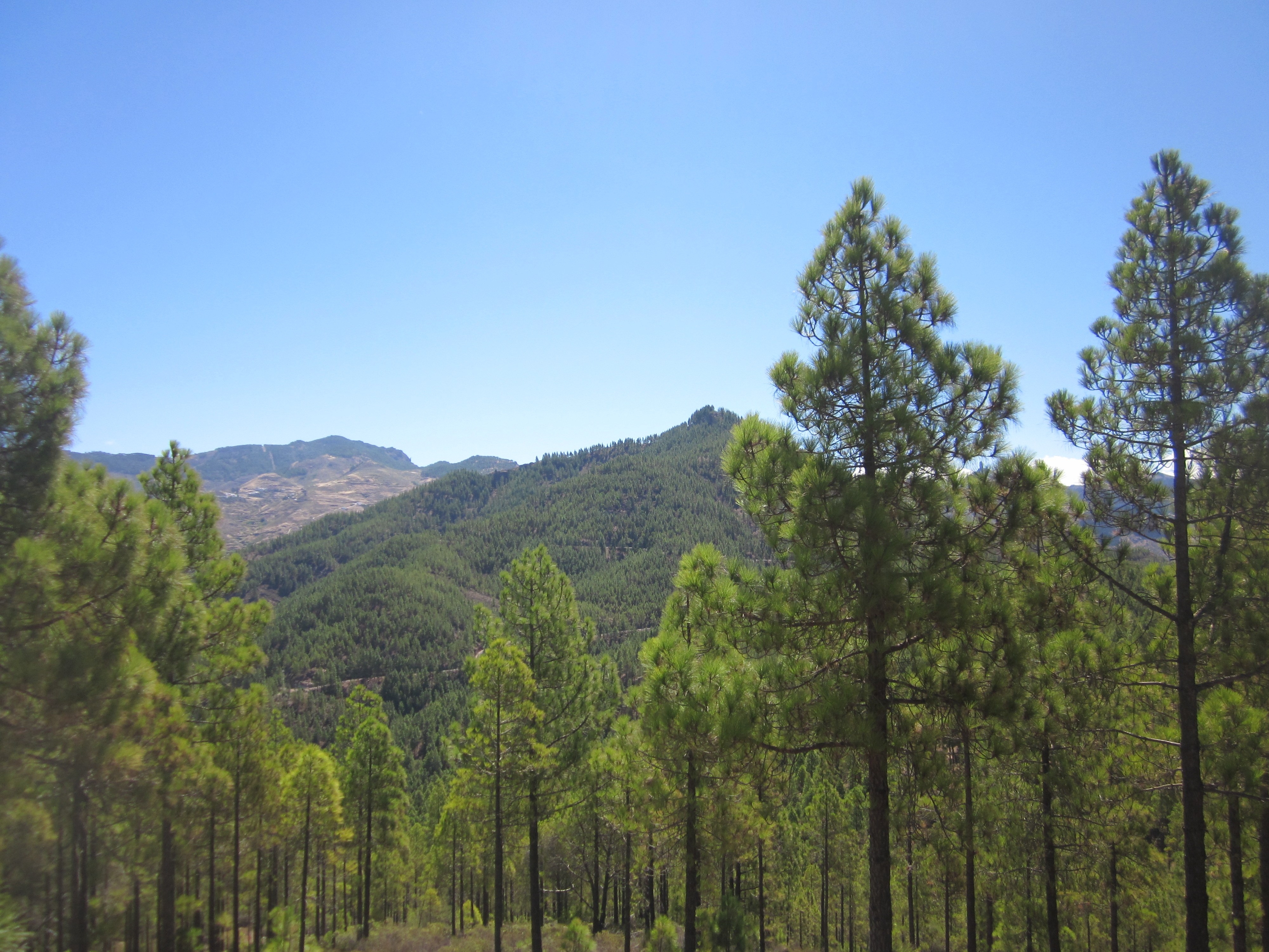 Parque natural de Tamadaba This is a photography of a Special Area of Conservation in Spain with the ID: ES0000111. Natura2000 entry, EEA entry